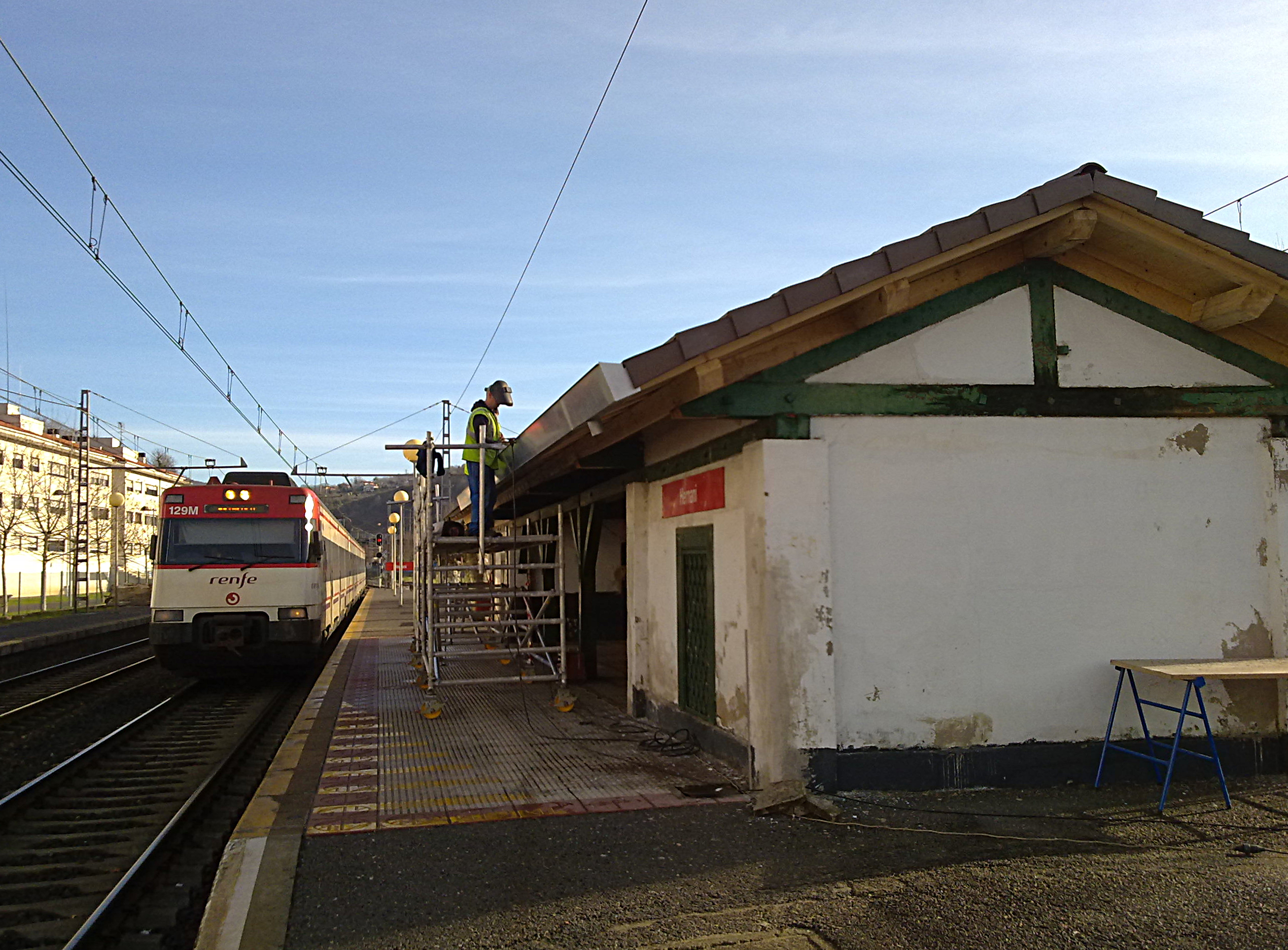 Refugio para viajero en 2010 mientras era renovado